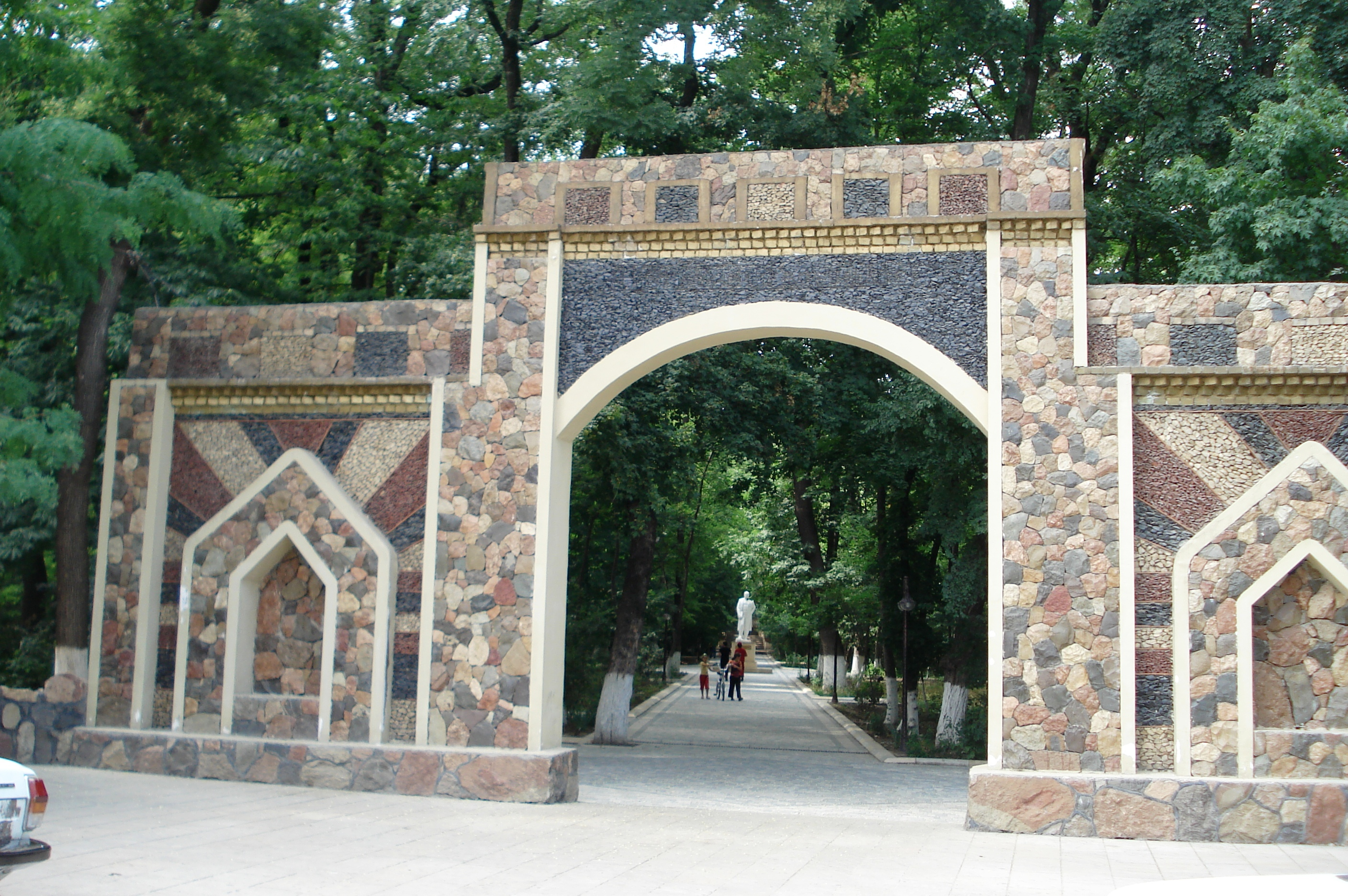 Входв кусарский парк